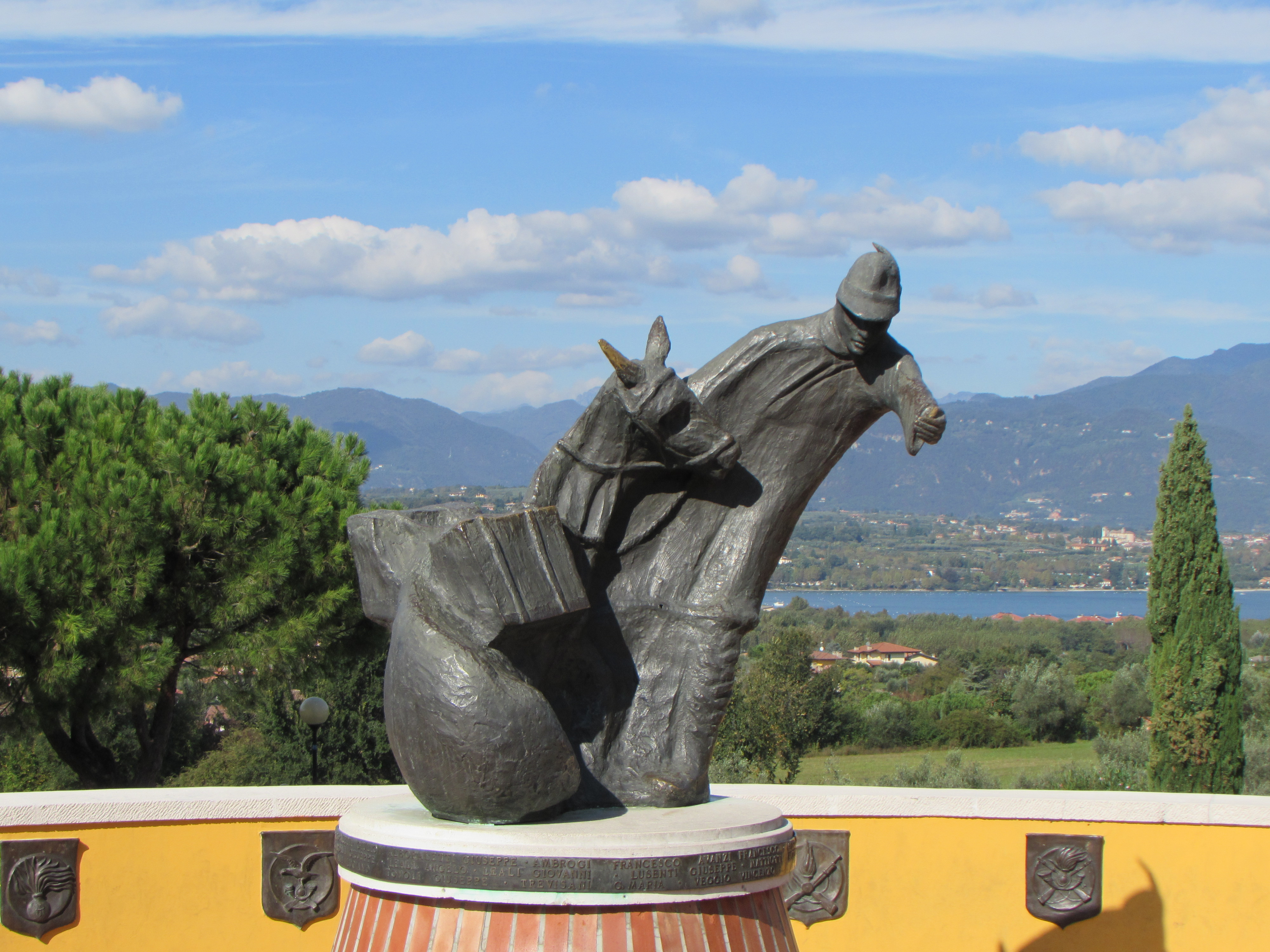 Monumento dedicato agli Alpini